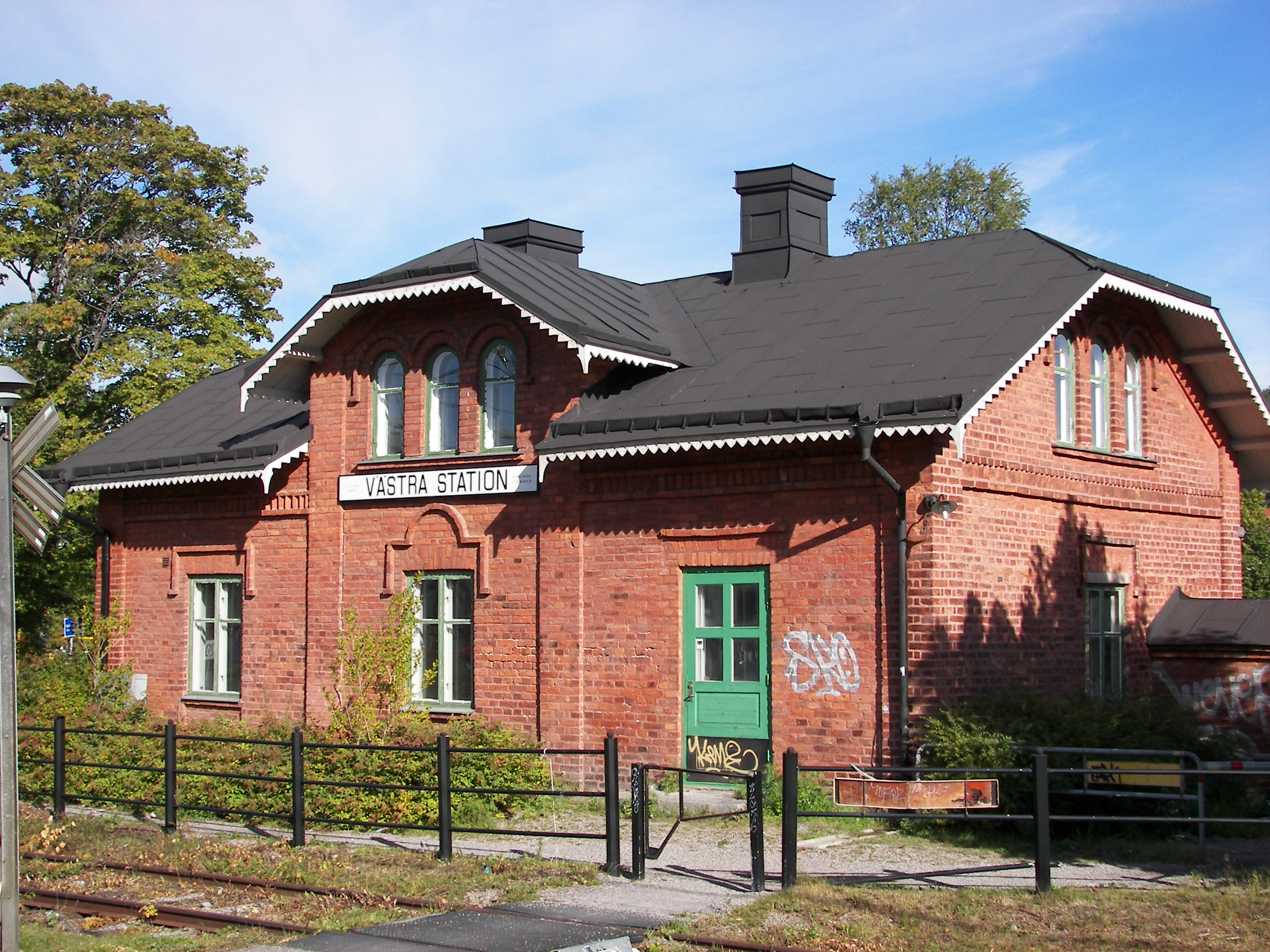 Västra station i Sundsvall sett från perrongen